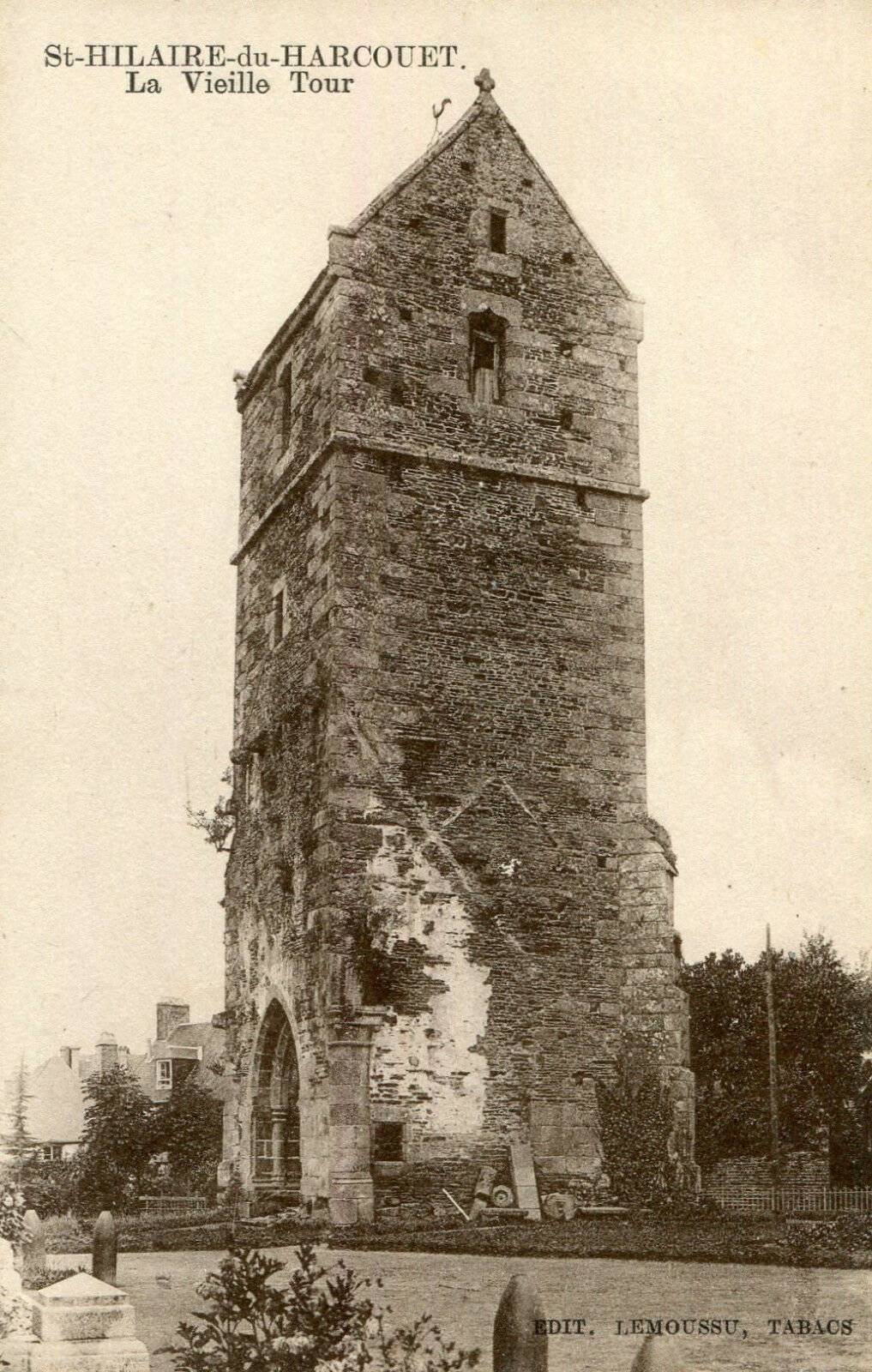 Ancien clocher de Saint-Hilaire-du-Harcouët. Département de la Manche. Carte postale ancienne, vers 1900.